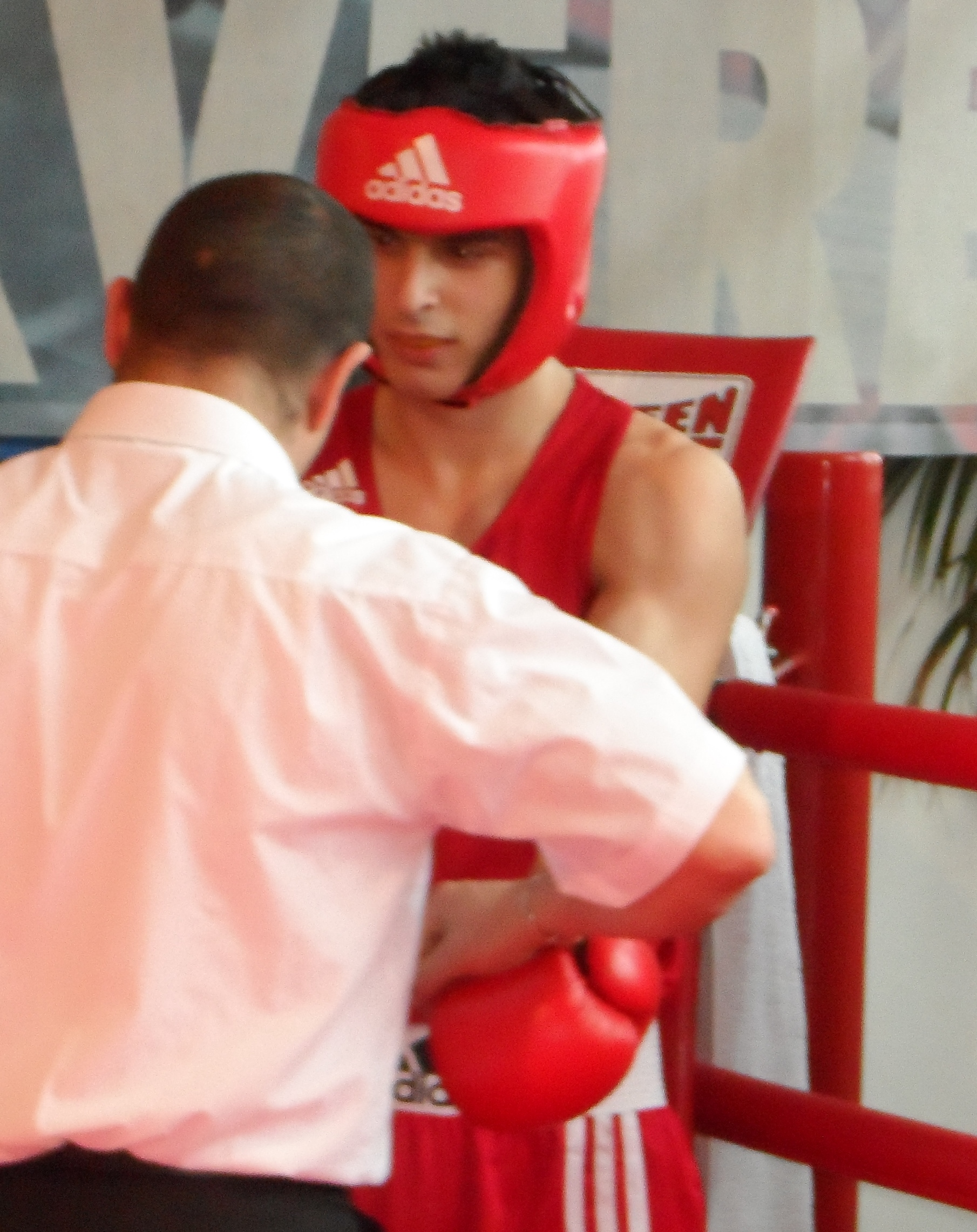 Boxing referee controls the gloves of an amateur boxer, Austria 2013